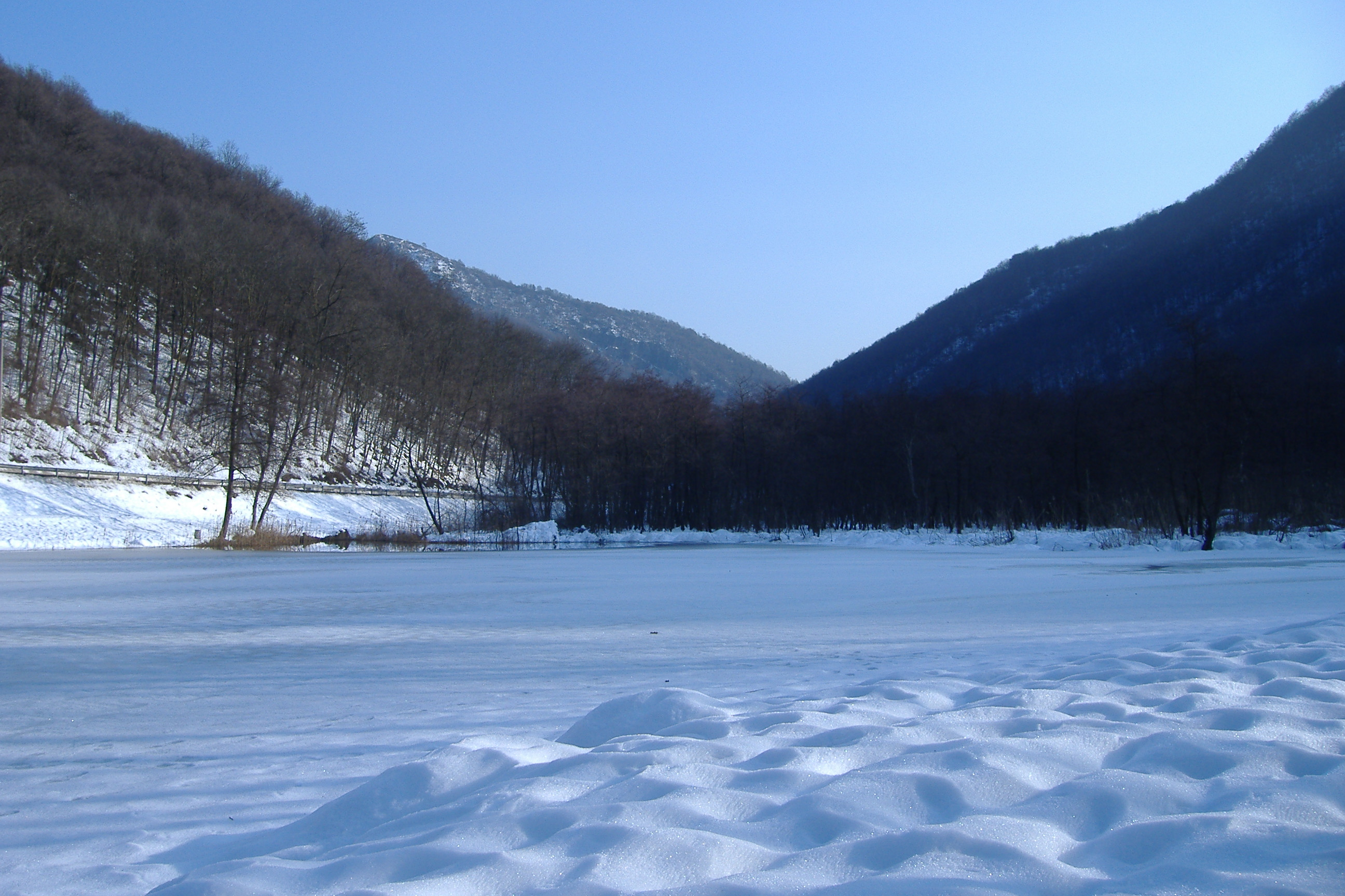 Il lago di Brinzio ghiacciato